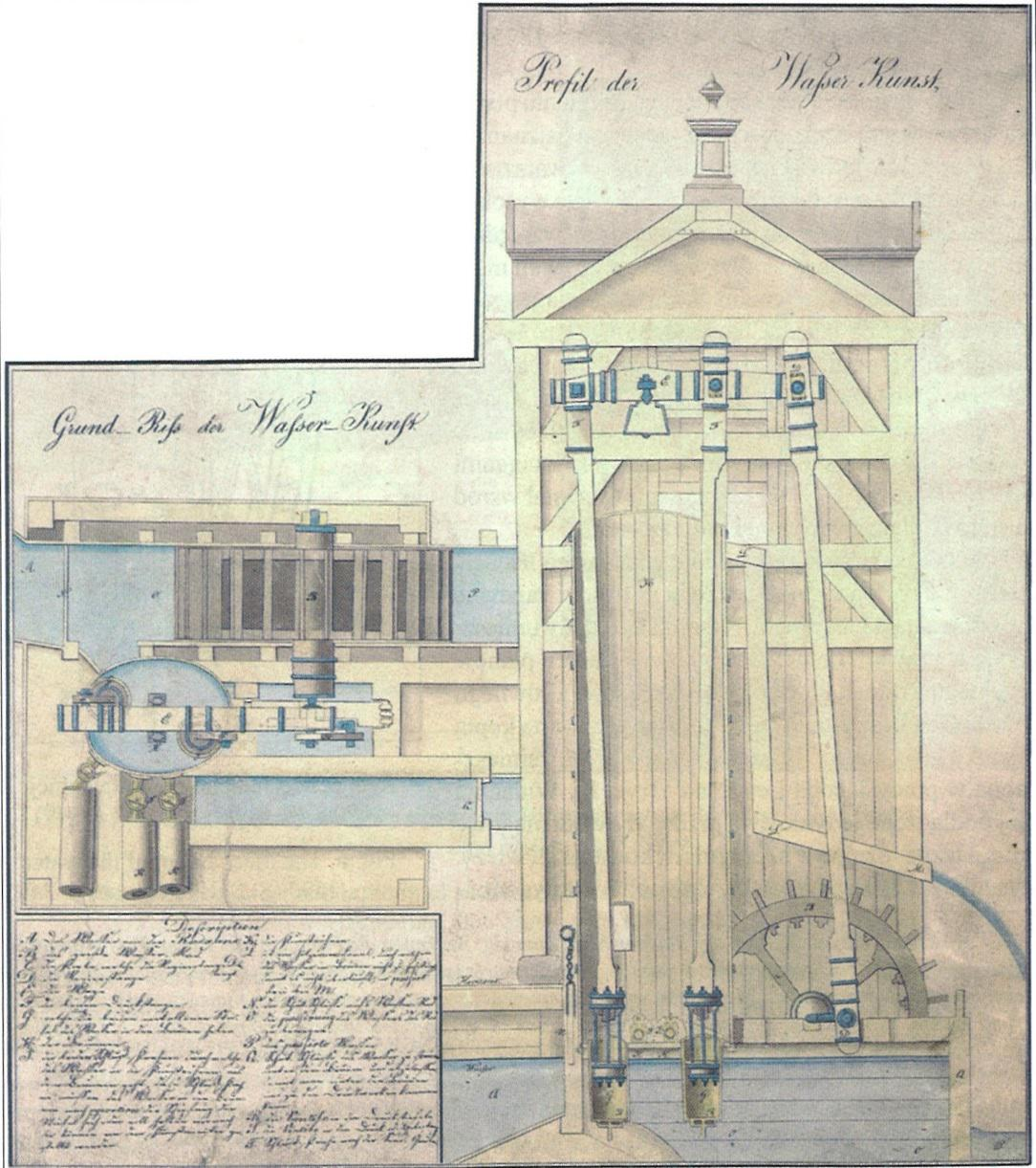 Gdański Kunszt Wodny, przekrój poprzeczny, 1825